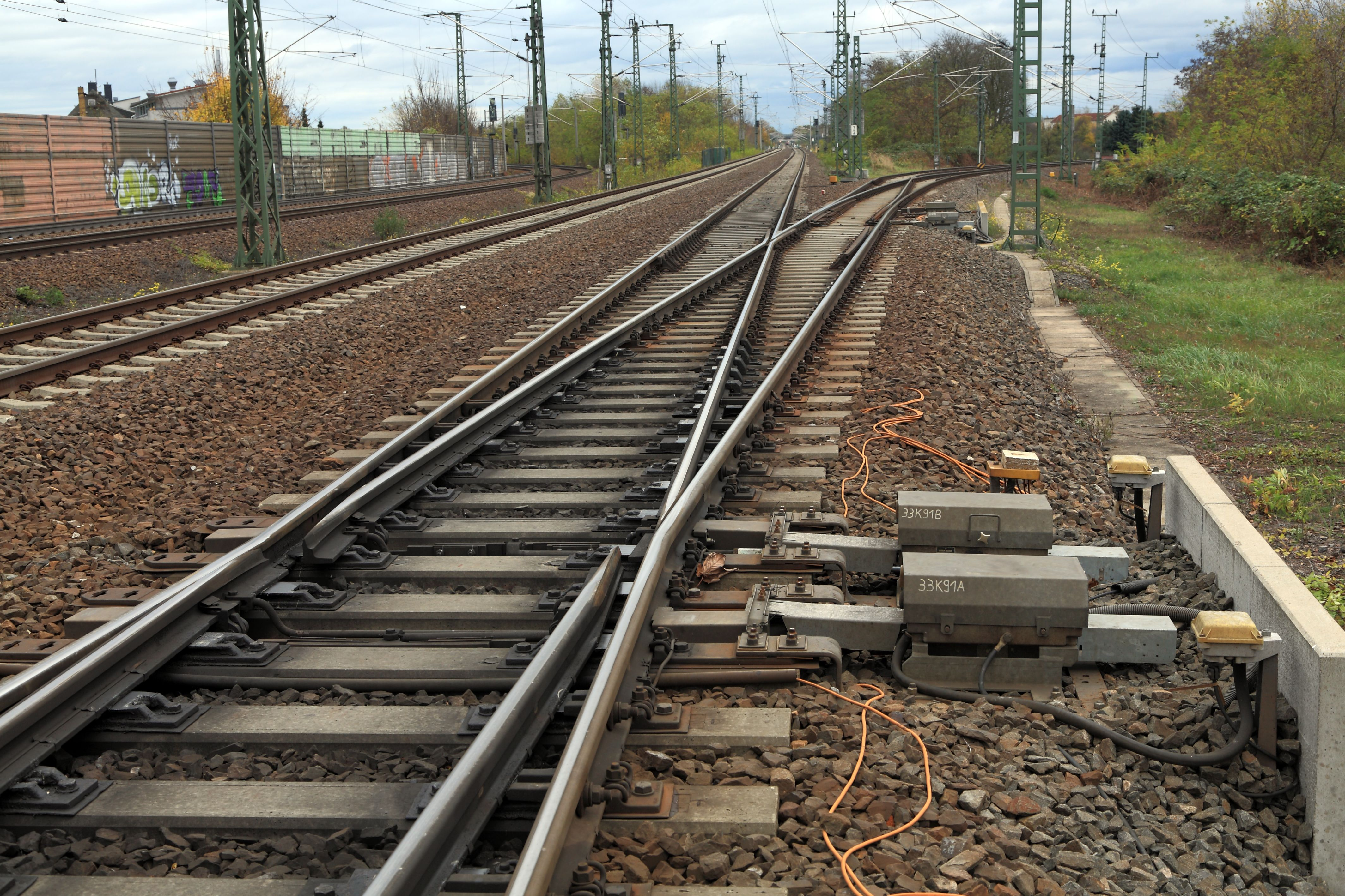 Richtung Osten, zweigleisig geradeaus führt die S-Bahn-Strecke 6382 zum Bf Leipzig MTh, vom Klv-Bahnhof nach rechts die Güterringstrecke Leutzsch–Wahren (6380). Ganz links die jetzigen Güterzuggleise der Strecke 6403.